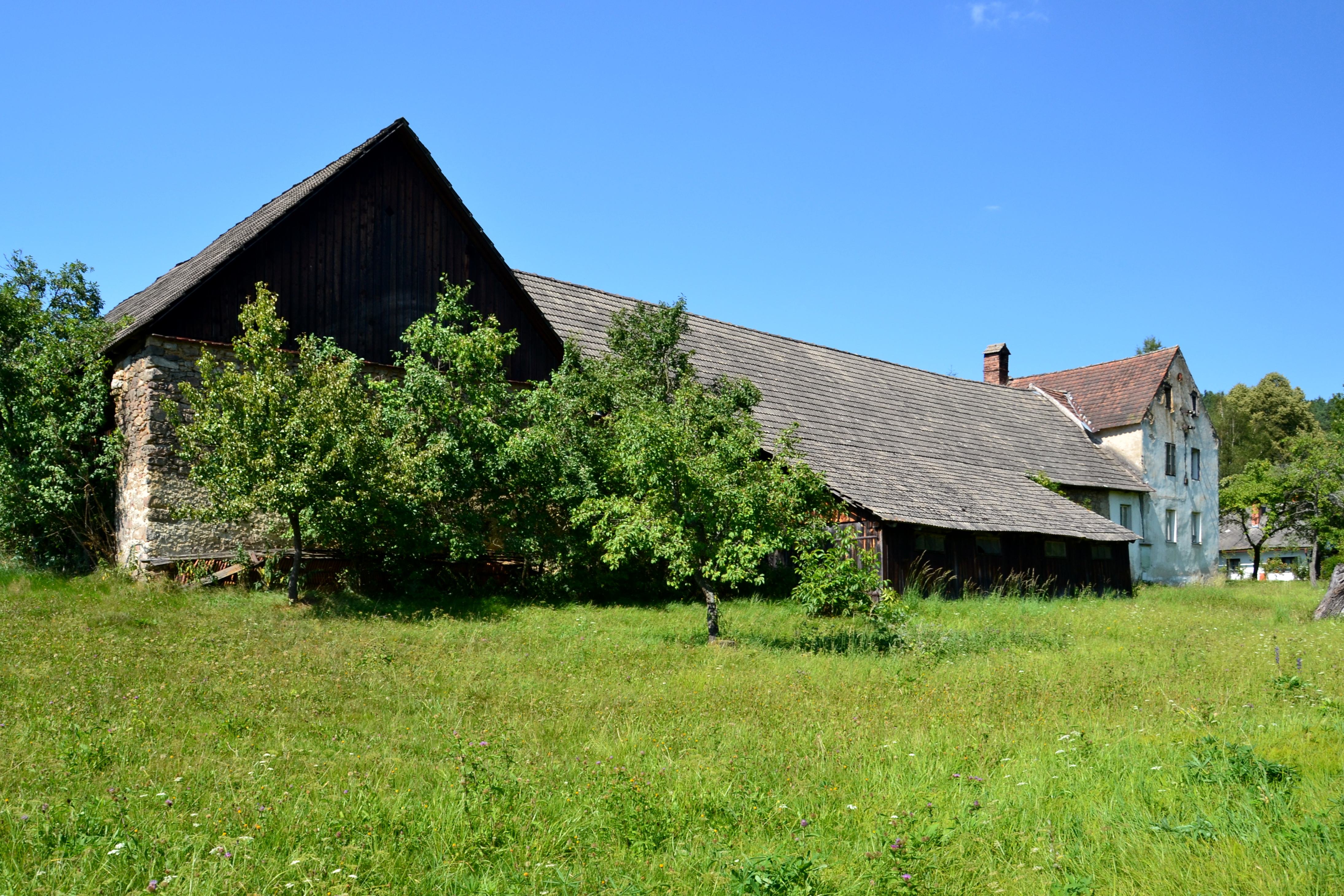 Statek